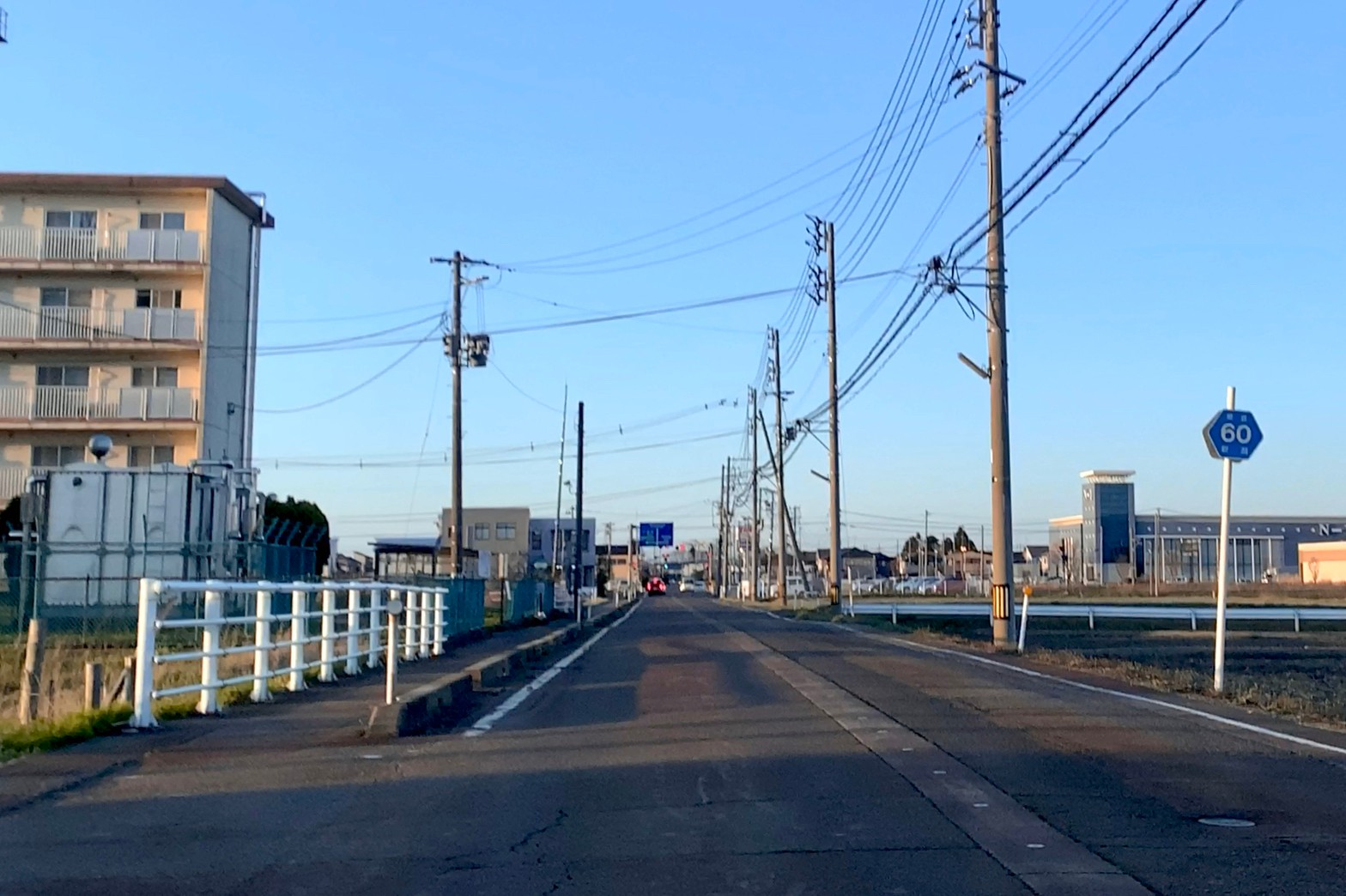 新潟県道60号住吉上館線 新発田市西宮内付近（2020年4月）